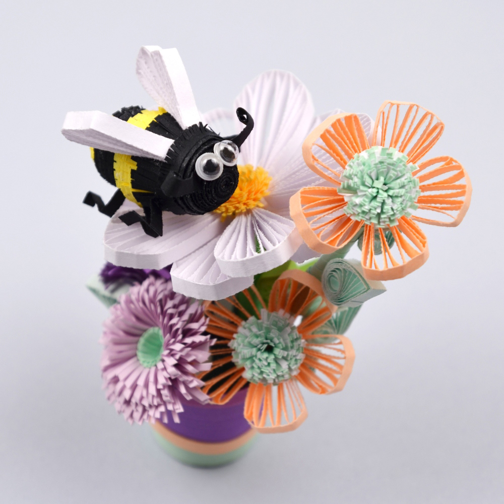 Včelka na květu vytvořená pomocí 3D quillingu